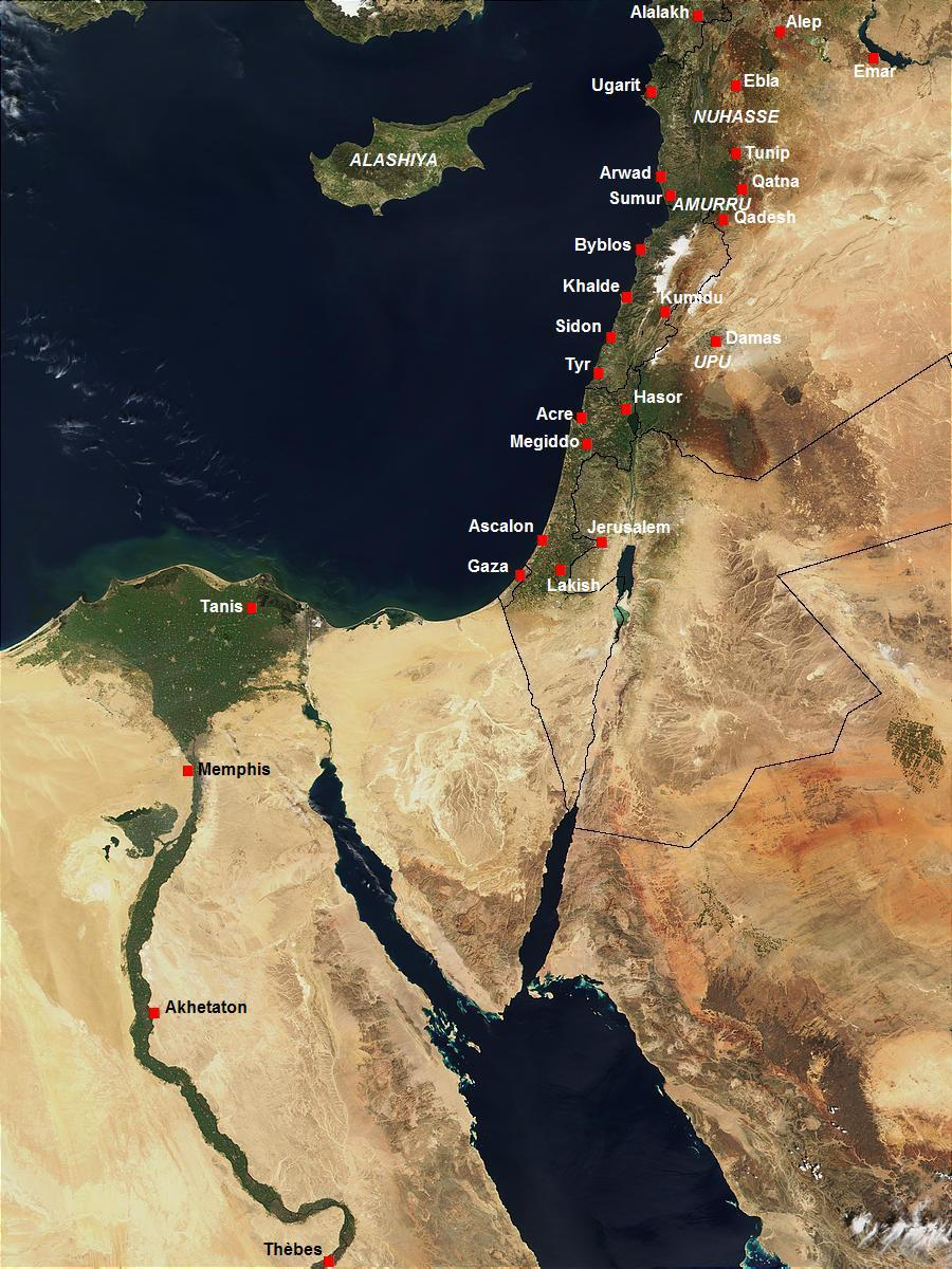 Carte représentant les principaux sites du Levant de l'époque d'el Amarna.